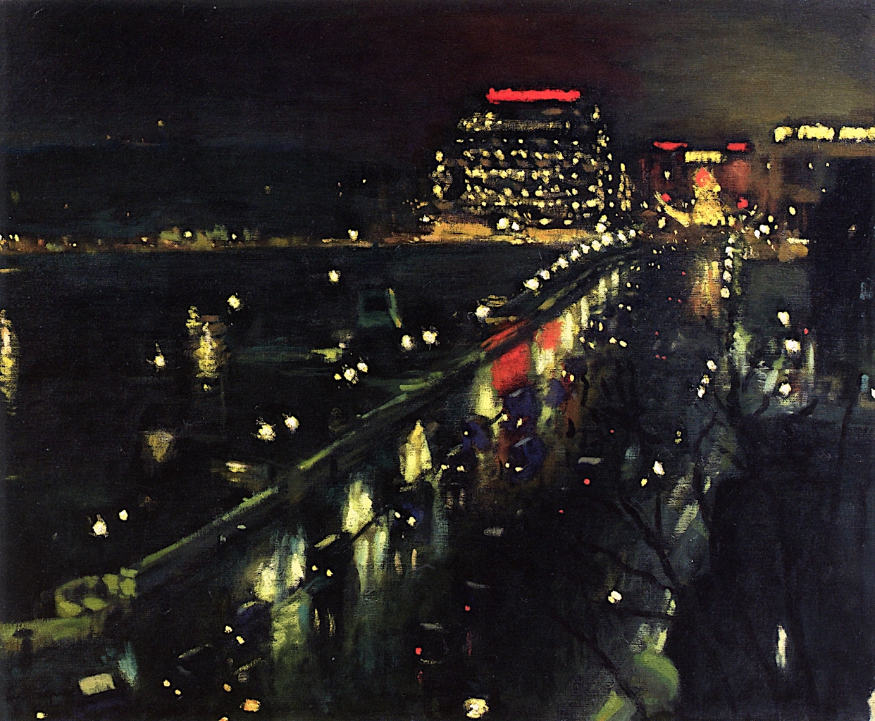 Le Pont-Neuf la nuit